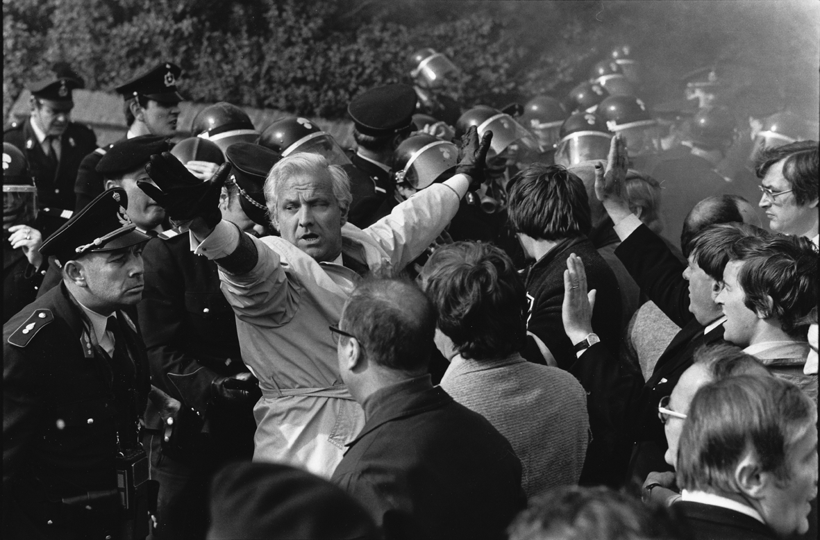 Vic Anciaux in Voeren